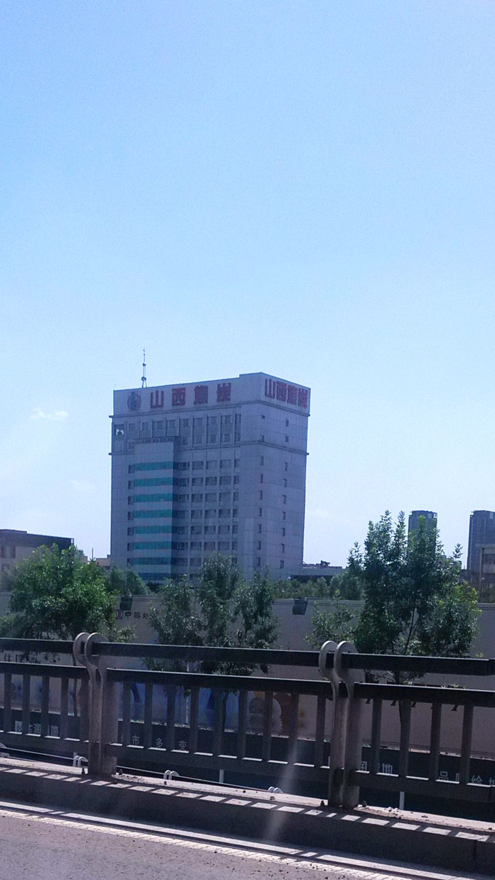 中文（中国大陆）: 山西焦炭办公大楼。